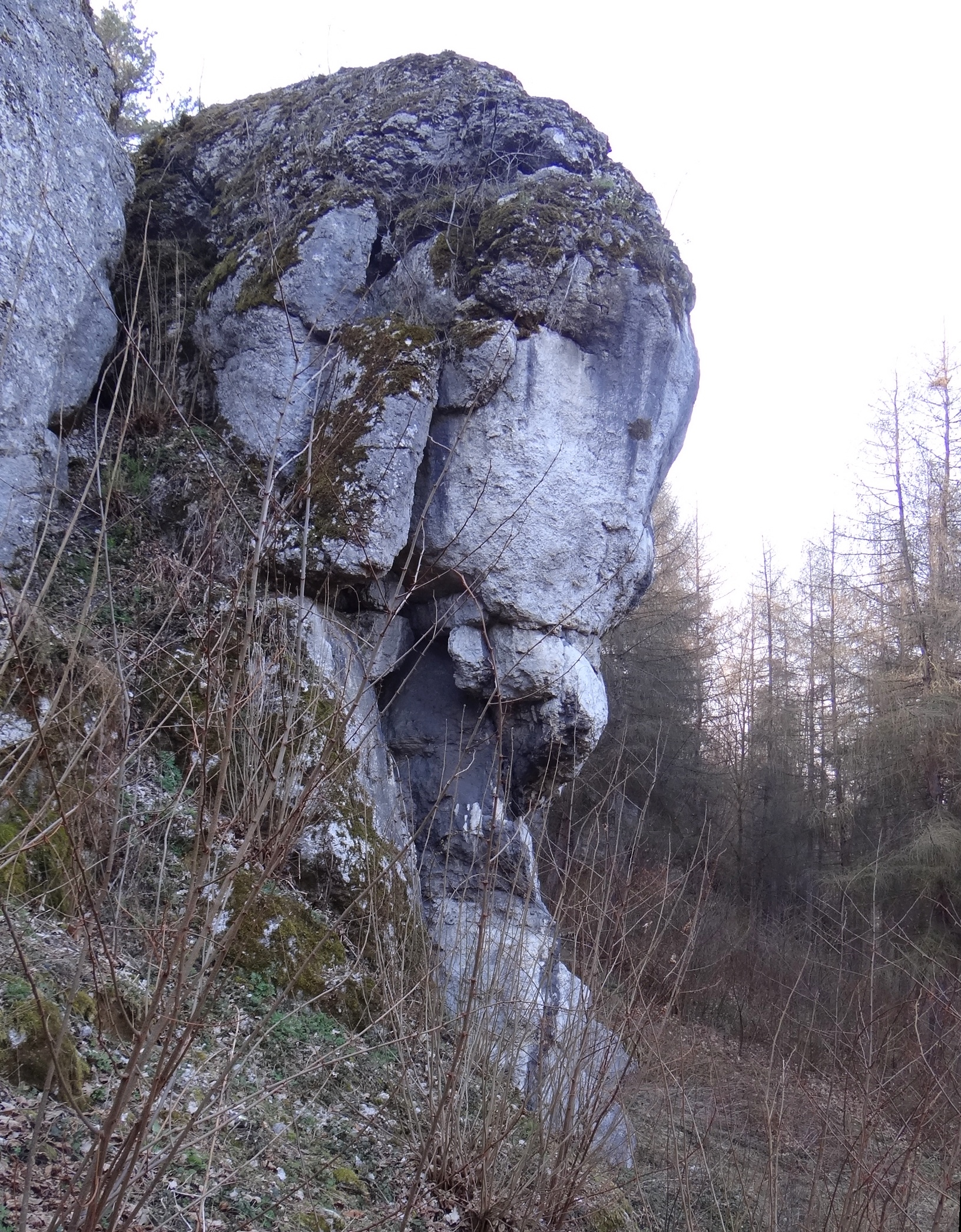 Skała Mysiura w Dolinie Brzoskwinki